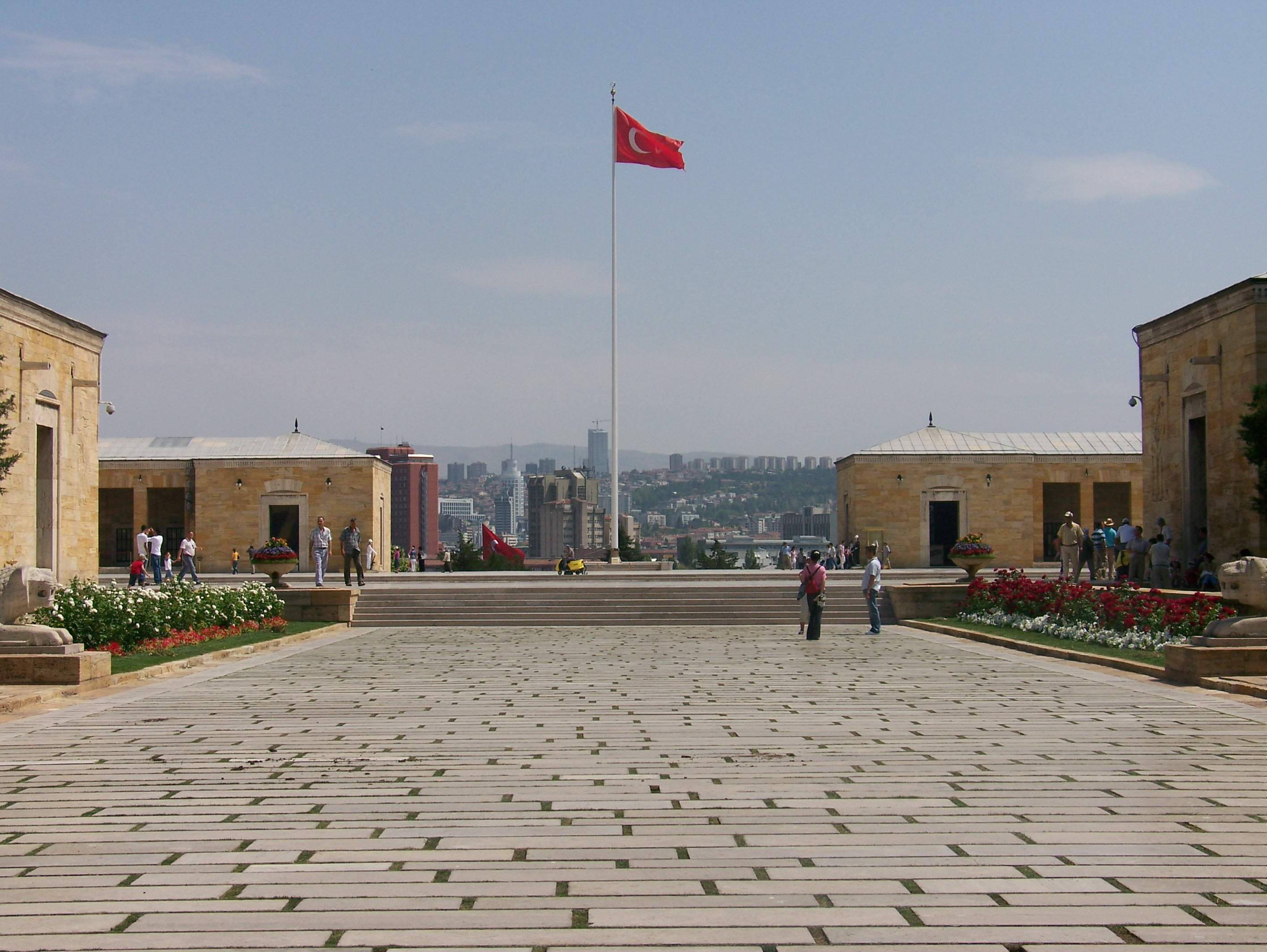 La grande allée d'Anitkabir